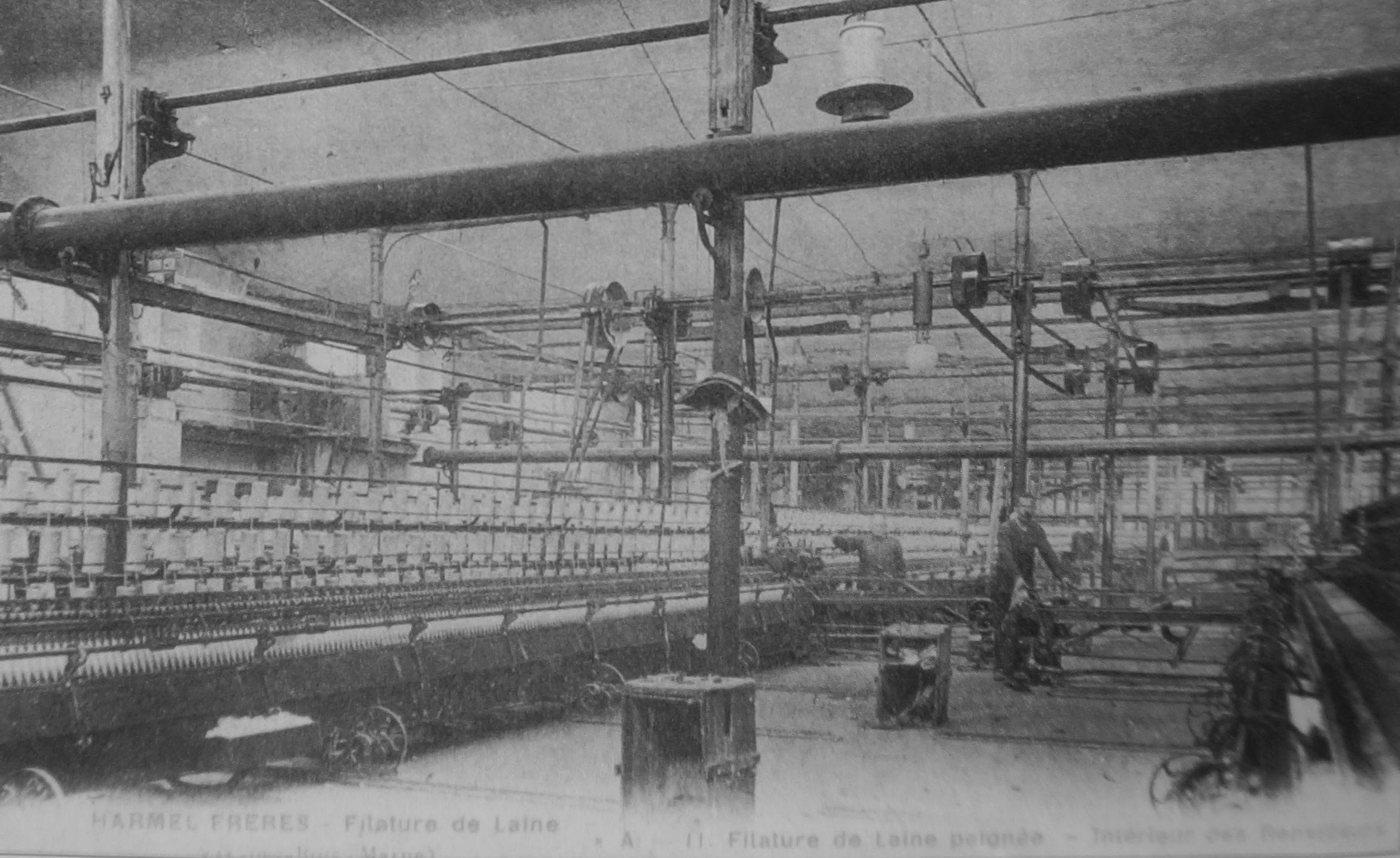 vue de cf titre.